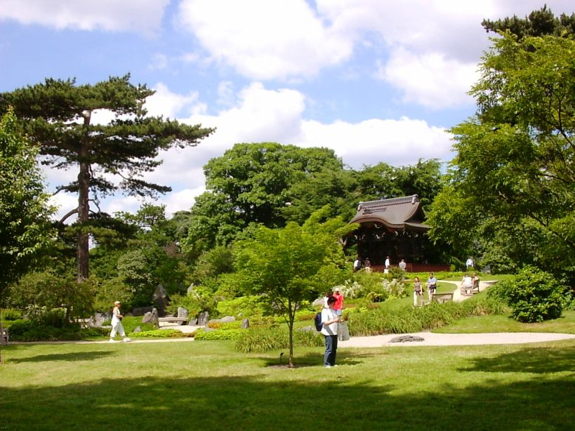 kew gardens - eigen foto